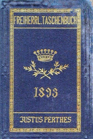 Titelseite des Freiherrlichen Taschenbuchs 1893